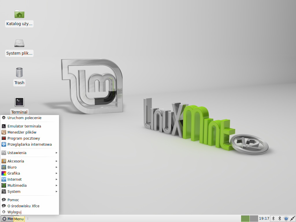 Linux Mint 12 (Lisa) ze środowiskiem graficznym Xfce